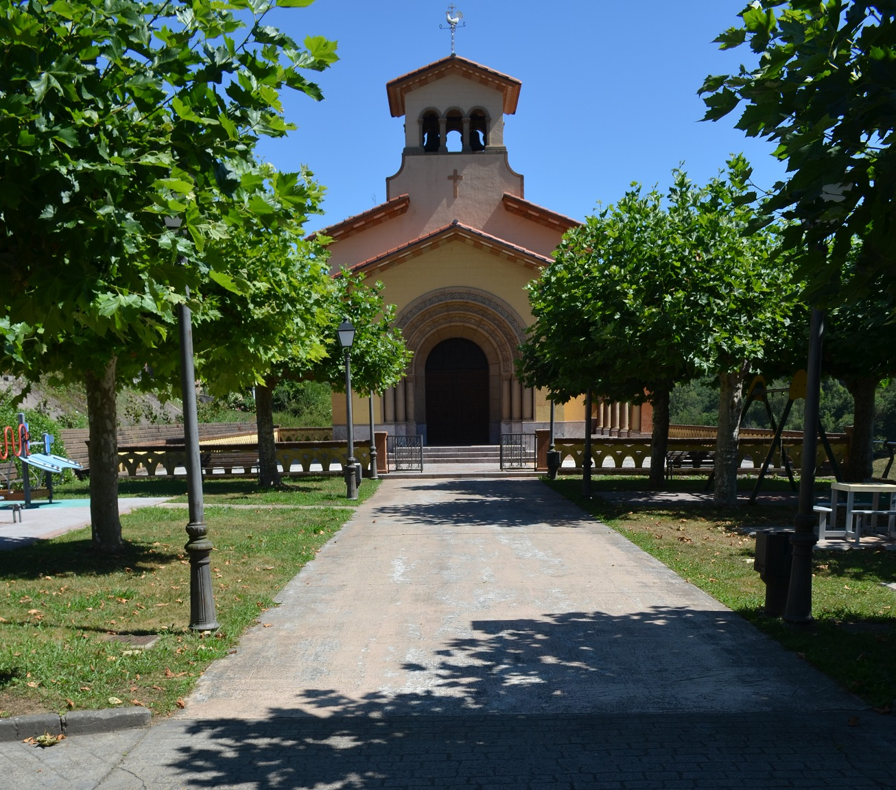 Capilla de Nuestra Señora de La Salud en el poblado minero de Solvay, parroquia asturiana de Lieres, España